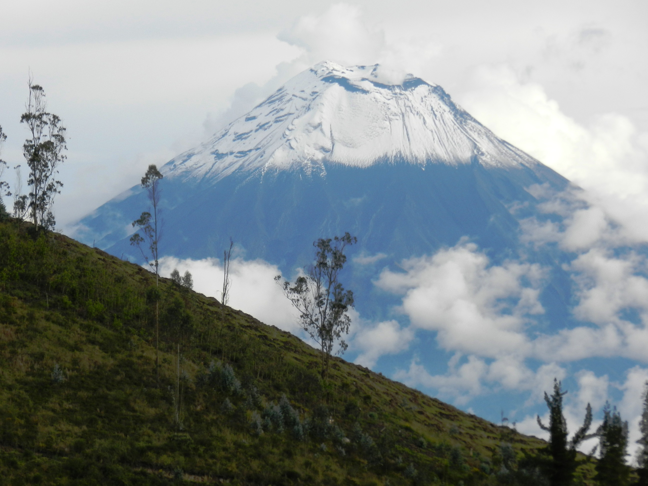 Vista del Volcán Tungurahua desde Hacienda Manteles